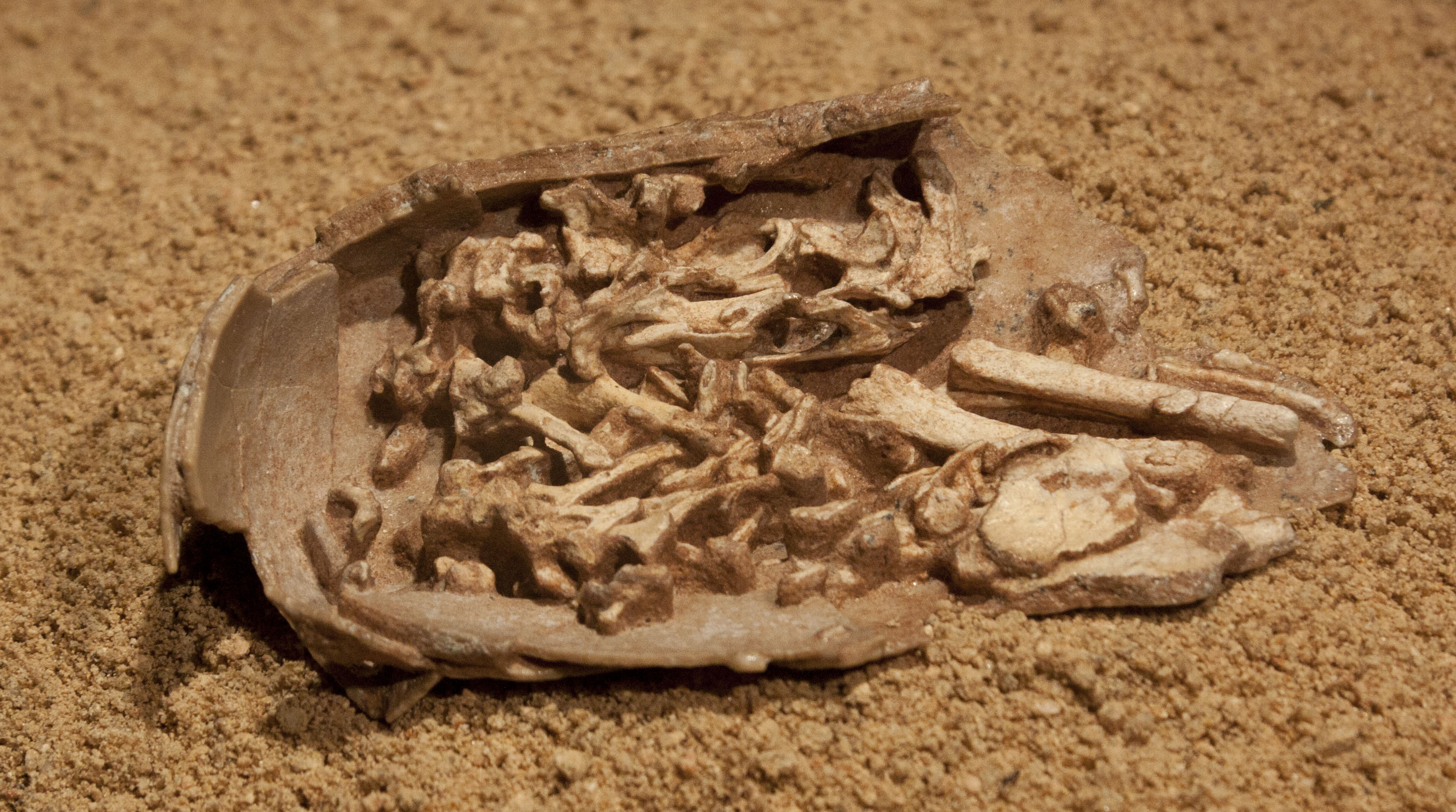 IMG_1221'